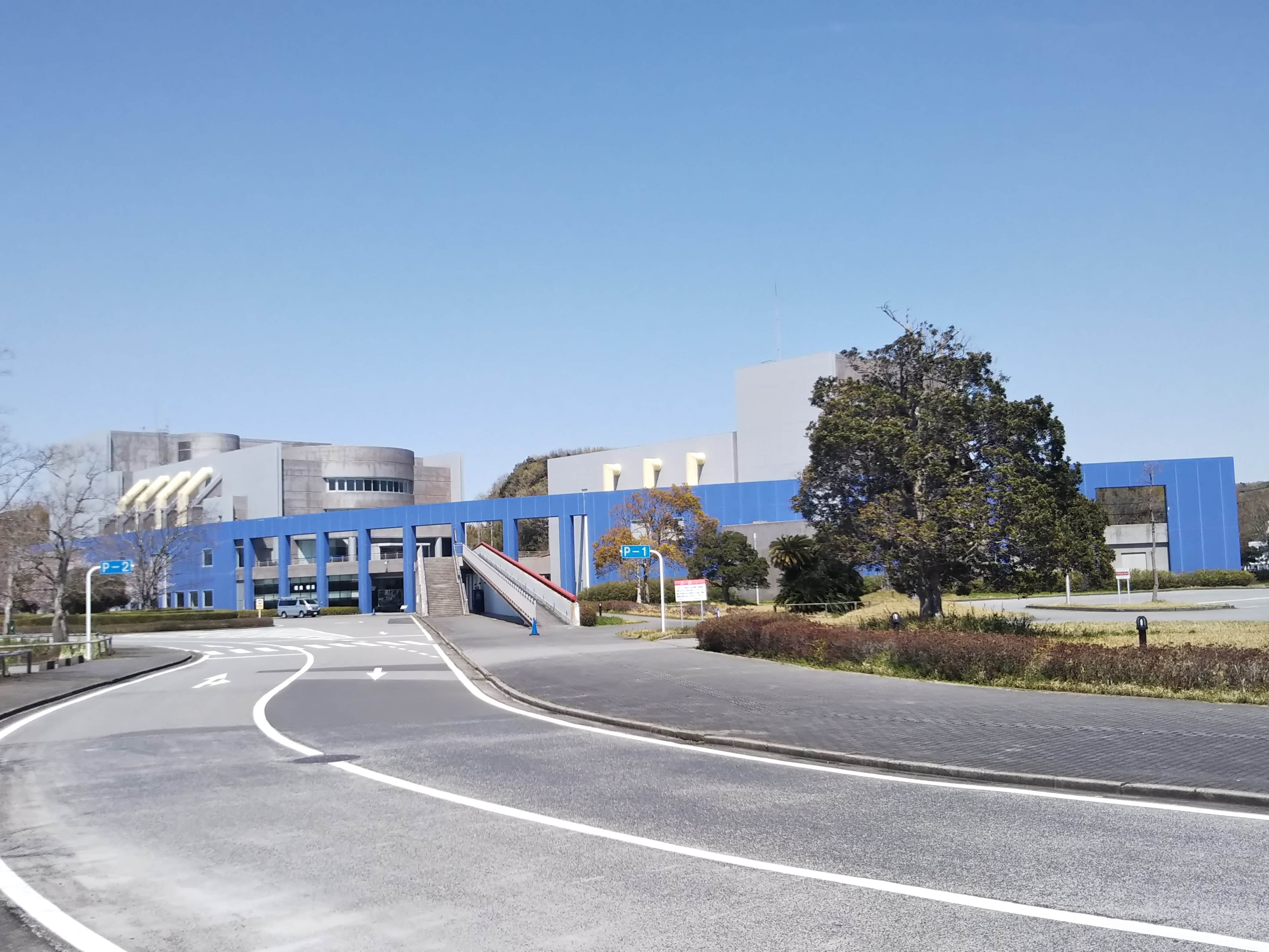 千葉県君津市三直、君津市民文化ホール